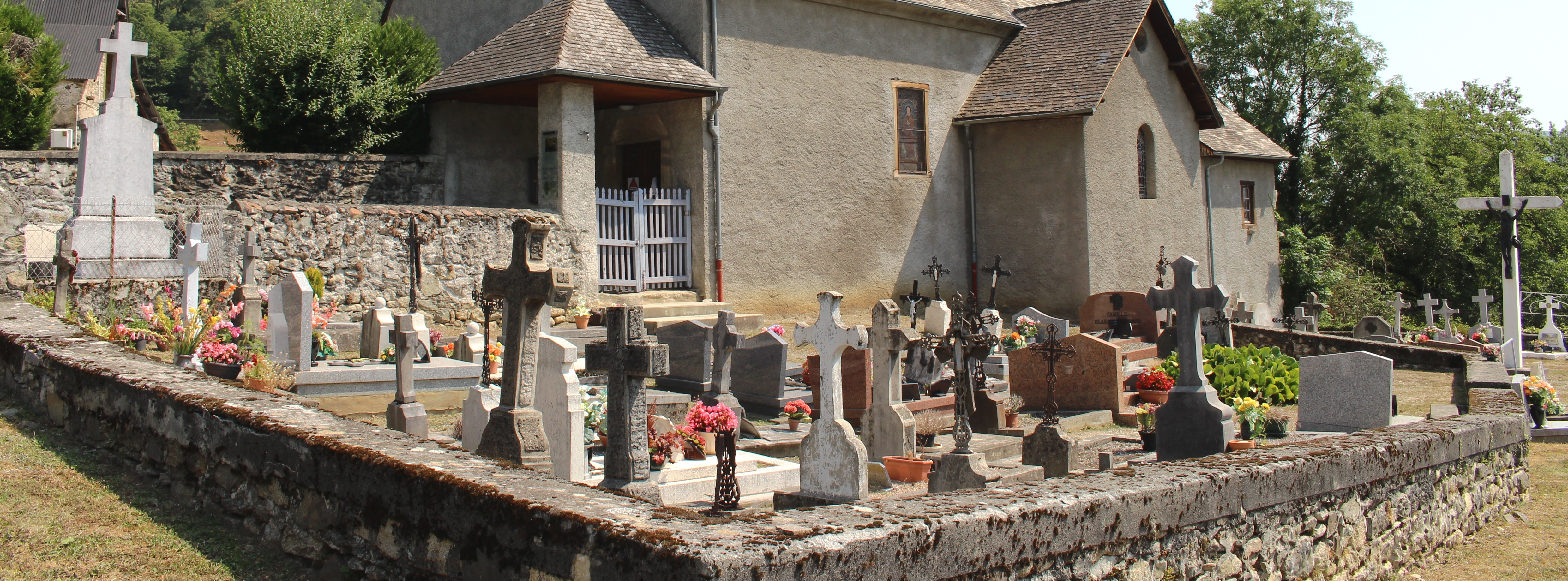 Cimetière de Gez (Hautes-Pyrénées)